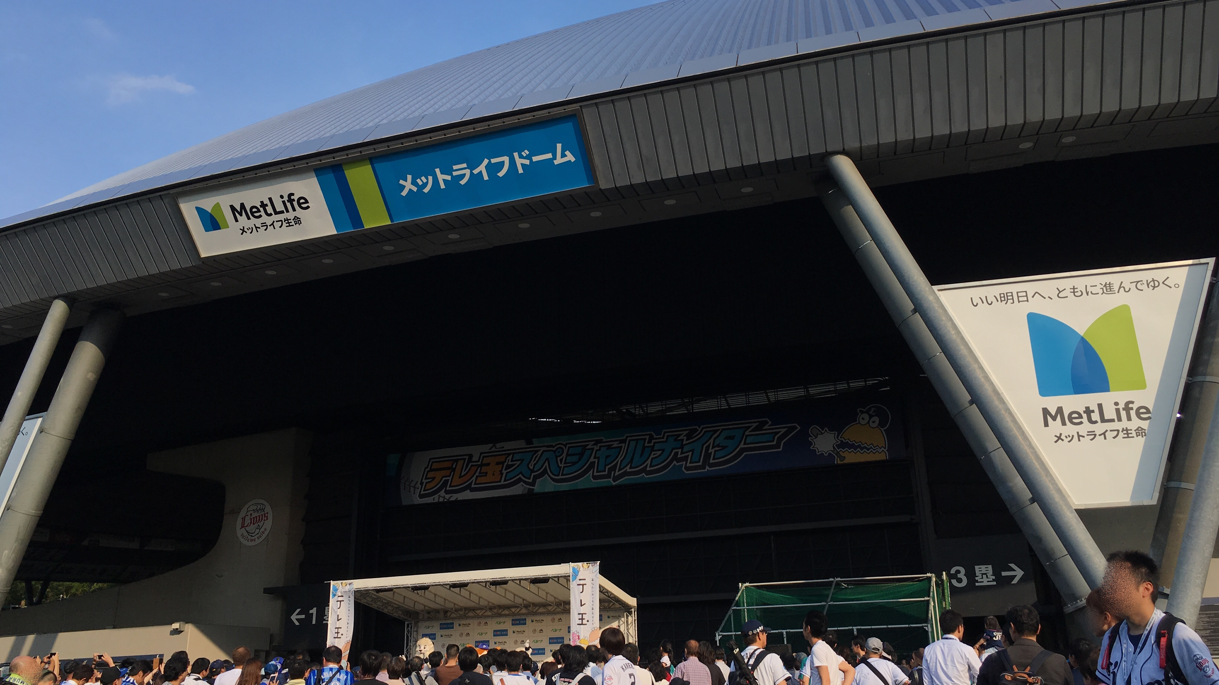 メットライフドーム（投稿者本人が撮影）